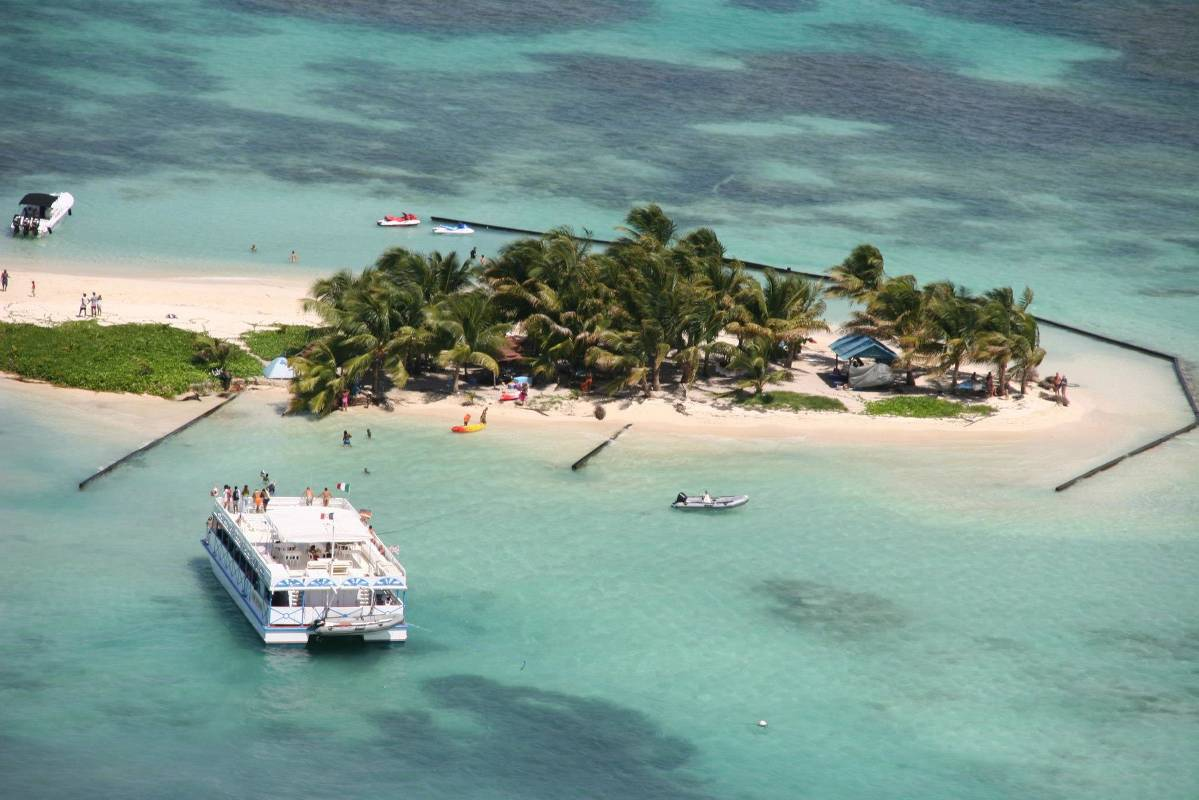 Bateau mouche de la Guadeloupe, King Papyrus, Îlet Caret